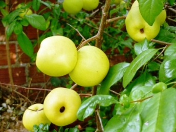 Arbuste et ses fruits inconnus. Ils poussent dans mon jardin dans le Val de Marne et j'aimerais bien savoir ce que c'est. D'après mes recherches, il pourrait s'agir de pommes de Kei. Quelqu'un pourrait-il confirmer? Les fruits sont-ils comestibles? si oui comment?